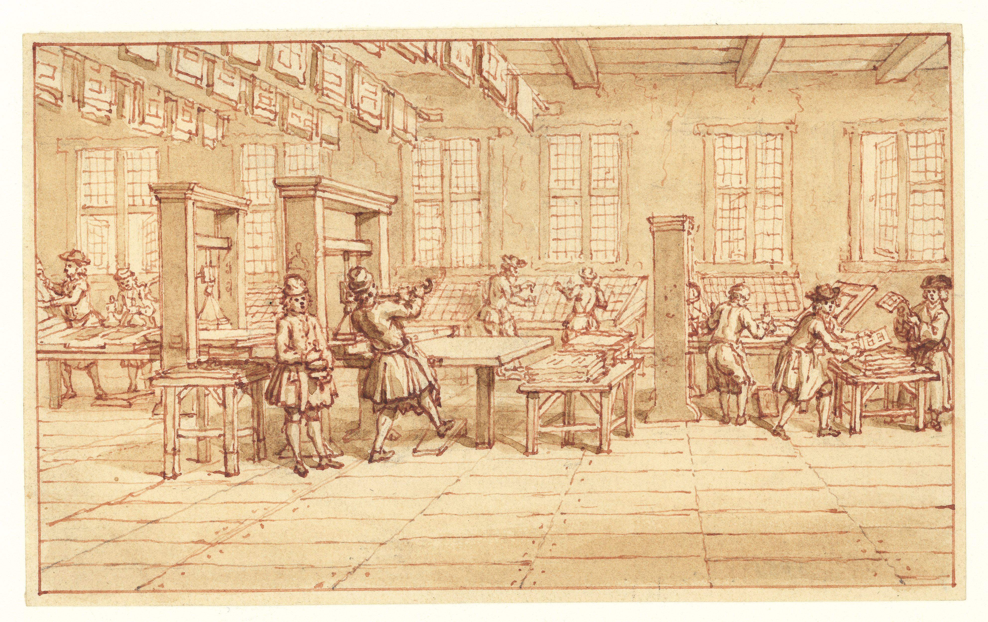 Collectie: Beeldbank Regionaal Archief Leiden Copyright: Creative Commons Naamsvermelding-Gelijk delen Titel: Gezicht in een drukkerij Signatuur: PV34430 Oud PV nummer: PV34430 Maker: Onbekend Trefwoord: Tekenkunst, Grafische industrie Beschrijving: Tekening van een interieur van een drukkerij omstreeks 1700. Formaat: 9,5 x 16 cm Techniek: Tekening in pen Datum van maken: Ca. 18e eeuw Datum afbeelding: Ca. 18e eeuw